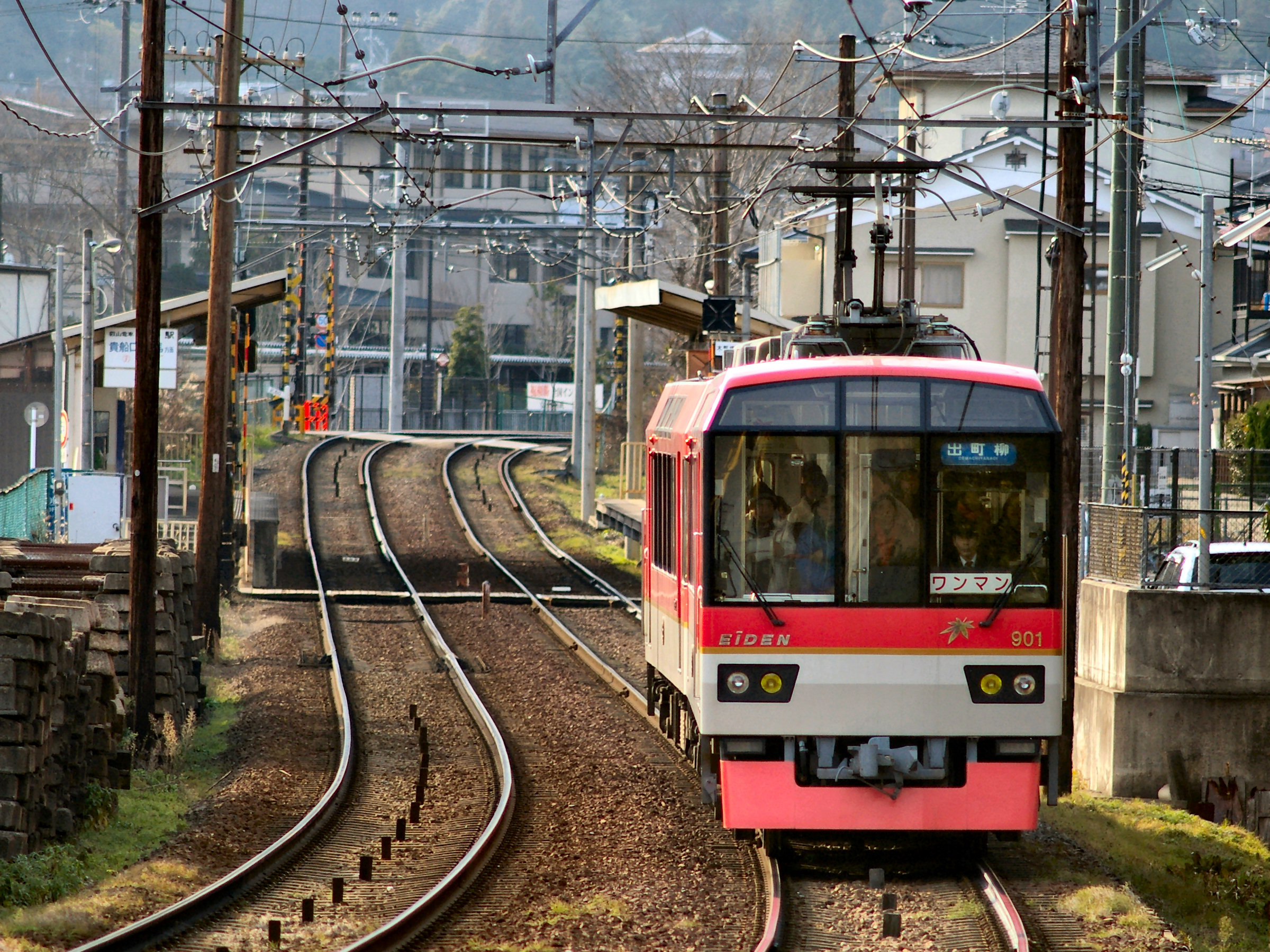 叡山電鉄鞍馬線 木野駅付近の風景